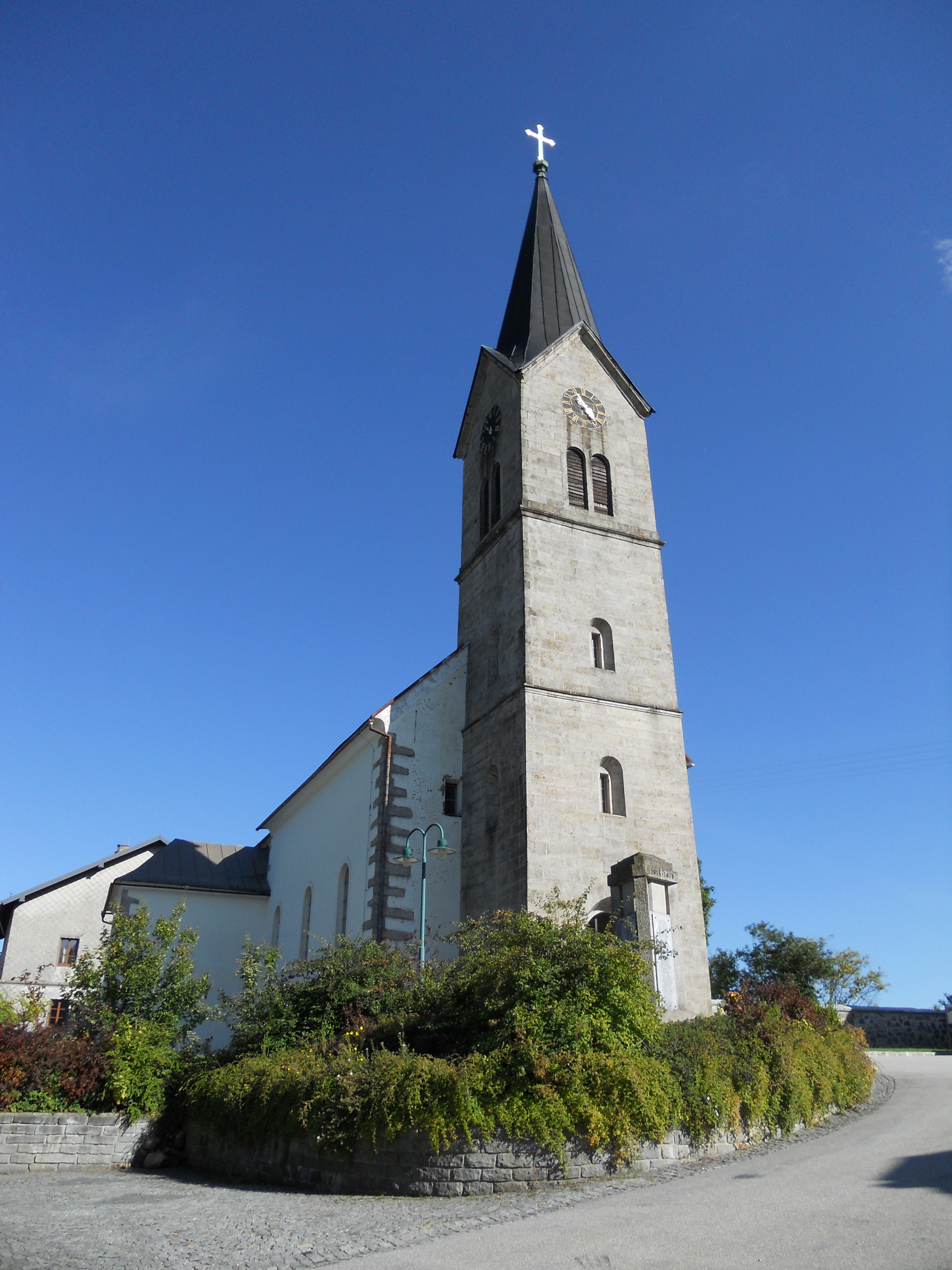 Die Kath. Pfarrkirche hl. Johannes Nepomuk in Scharzenberg am Böhmerwald in Oberösterreich(Bezirk Rohrbach)